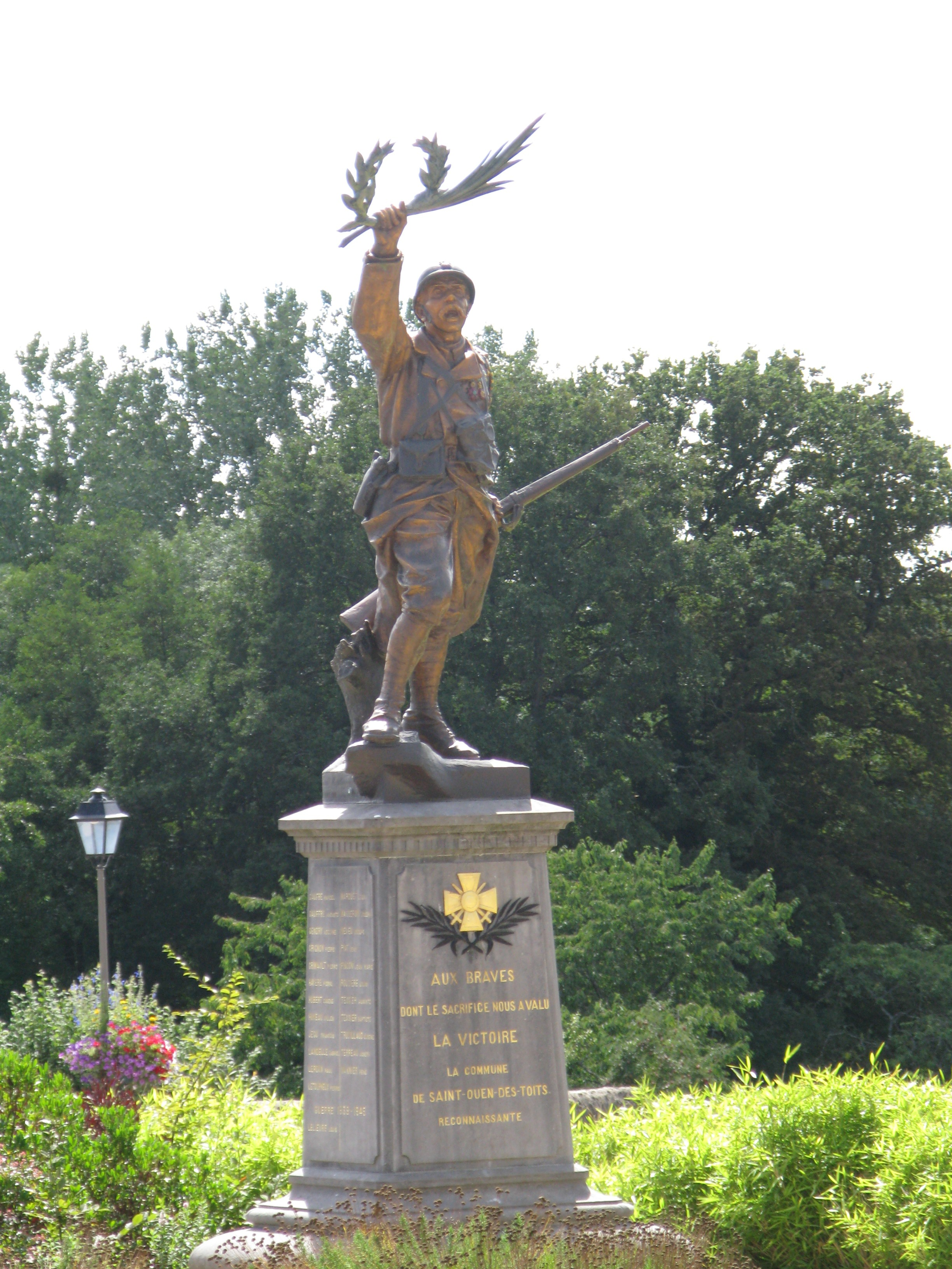 Monument aux morts de Saint-Ouën-des-Toits